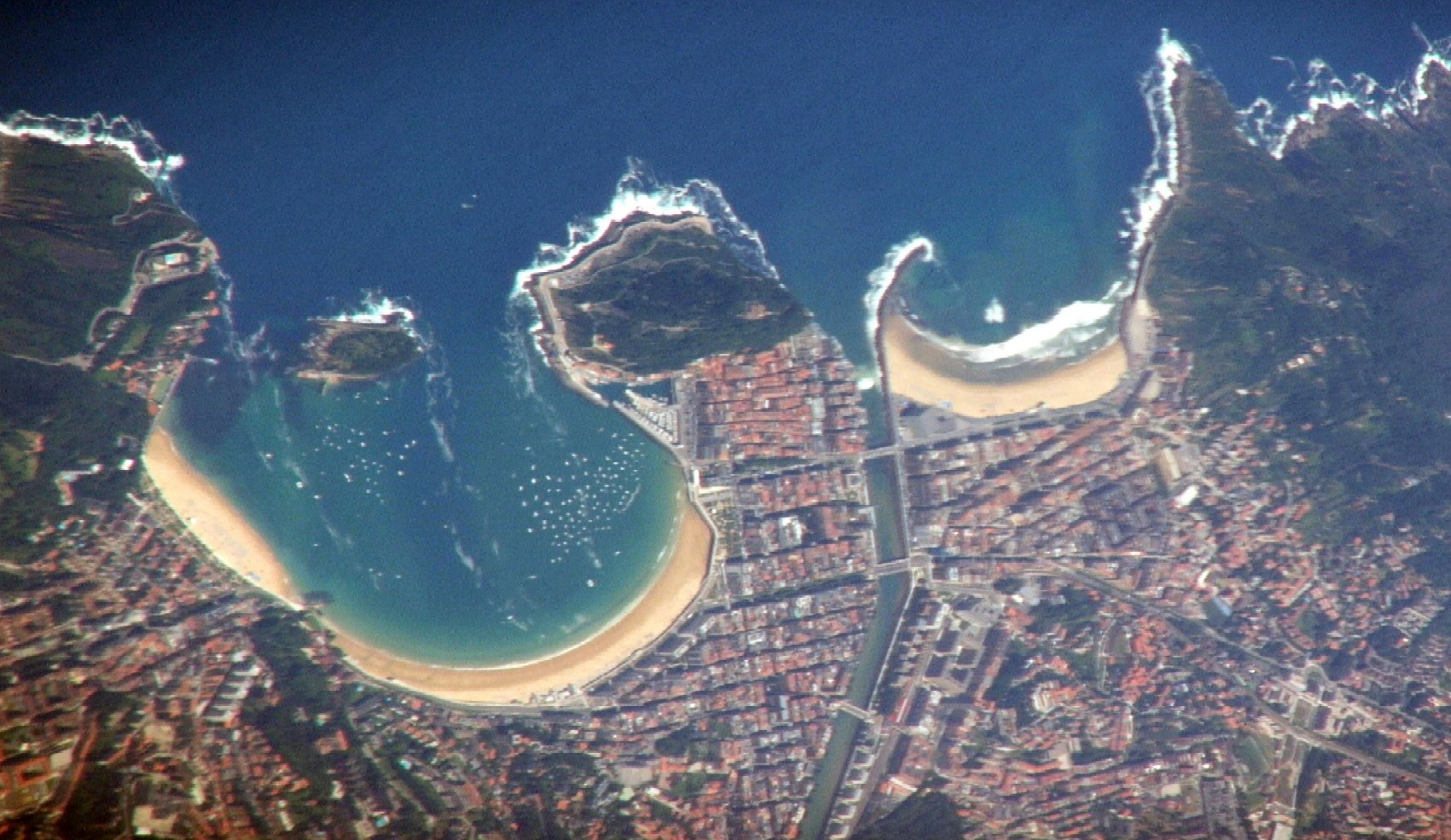 San Sebastian (España) desde el aire.